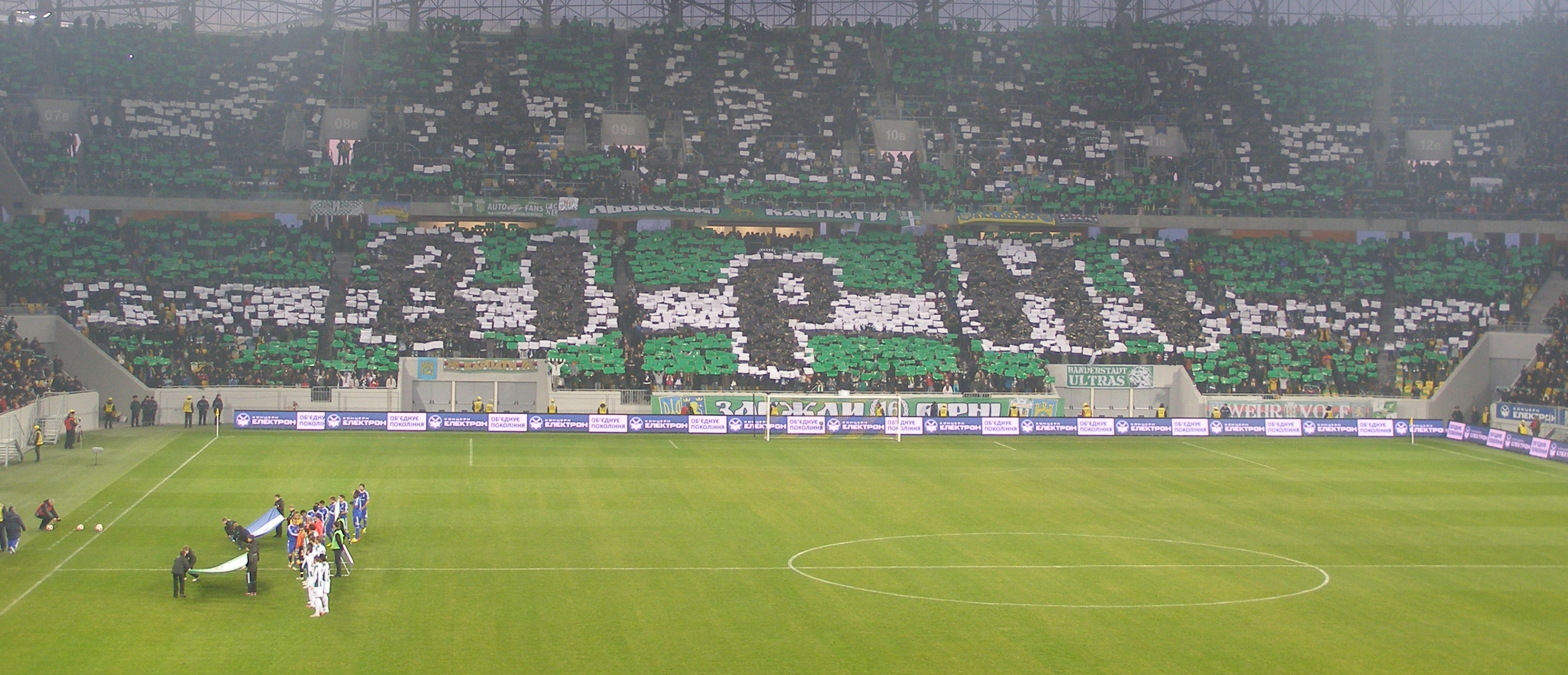 Модульне шоу на стадіоні "Арена Львів"